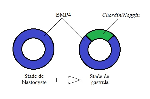 Schéma représentant la détermination de l'axe dorsal-ventral lors de l'embryogenèse chez les vertébrés.